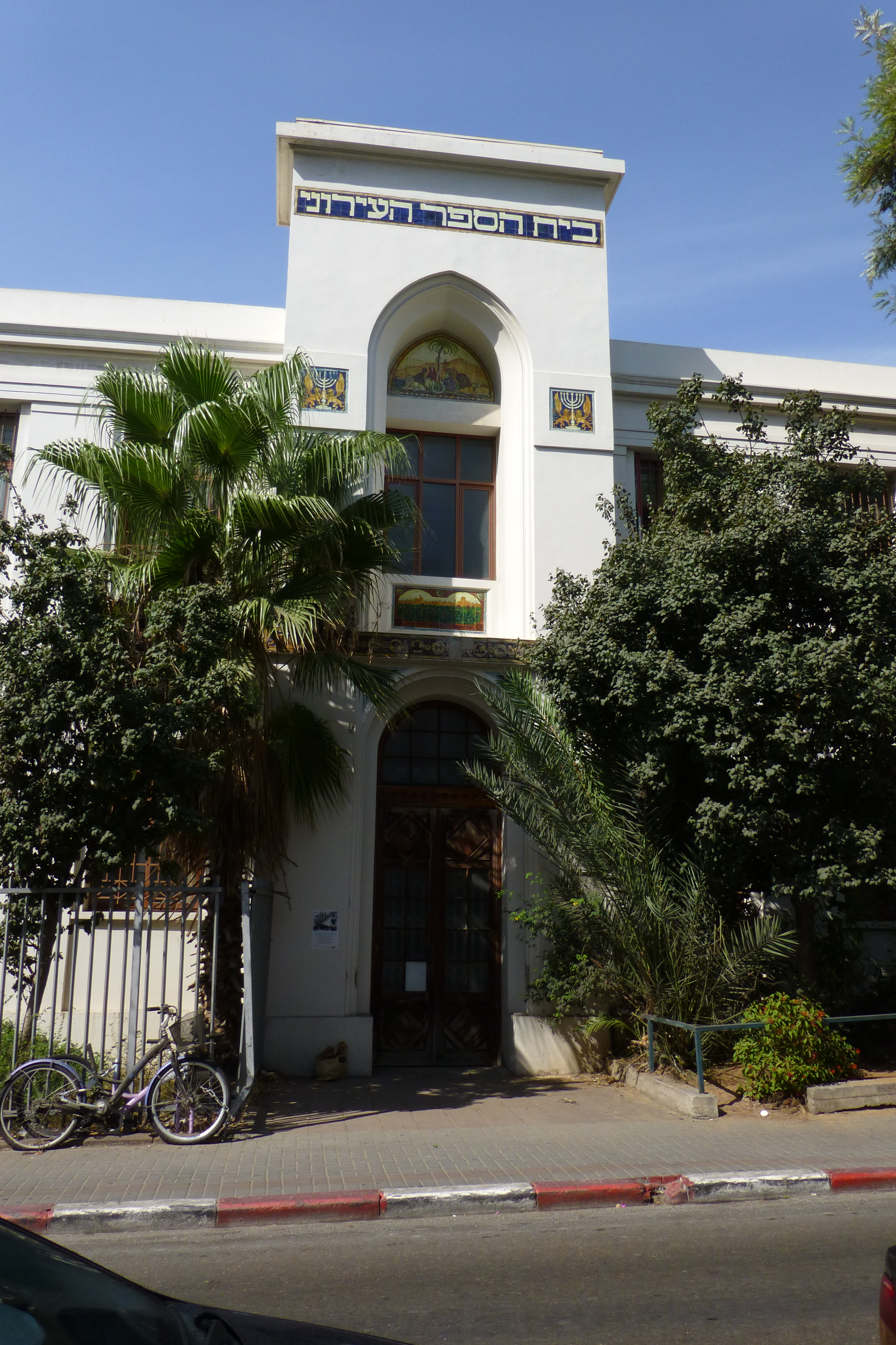 "בית הספר אחד העם" הוא מבנה בית ספר השוכן ברחוב אחד העם בתל אביב. בית הספר נבנה בשנת 1924 בתכנונו של האדריכל ד. הרשקוביץ כ"בית הספר העירוני", אולם לאחר שהוענק לאחד העם תואר אזרח כבוד של העיר, בשנת 1924, הוסב שמו של המבנה ל"בית הספר אחד העם".